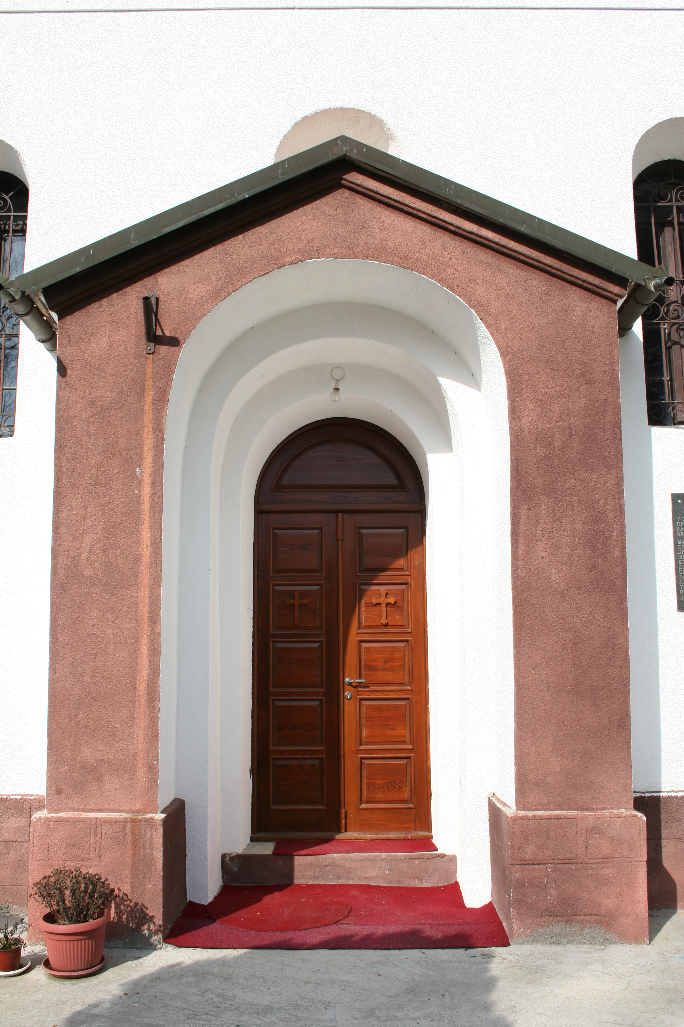 Manastir Pambukovica